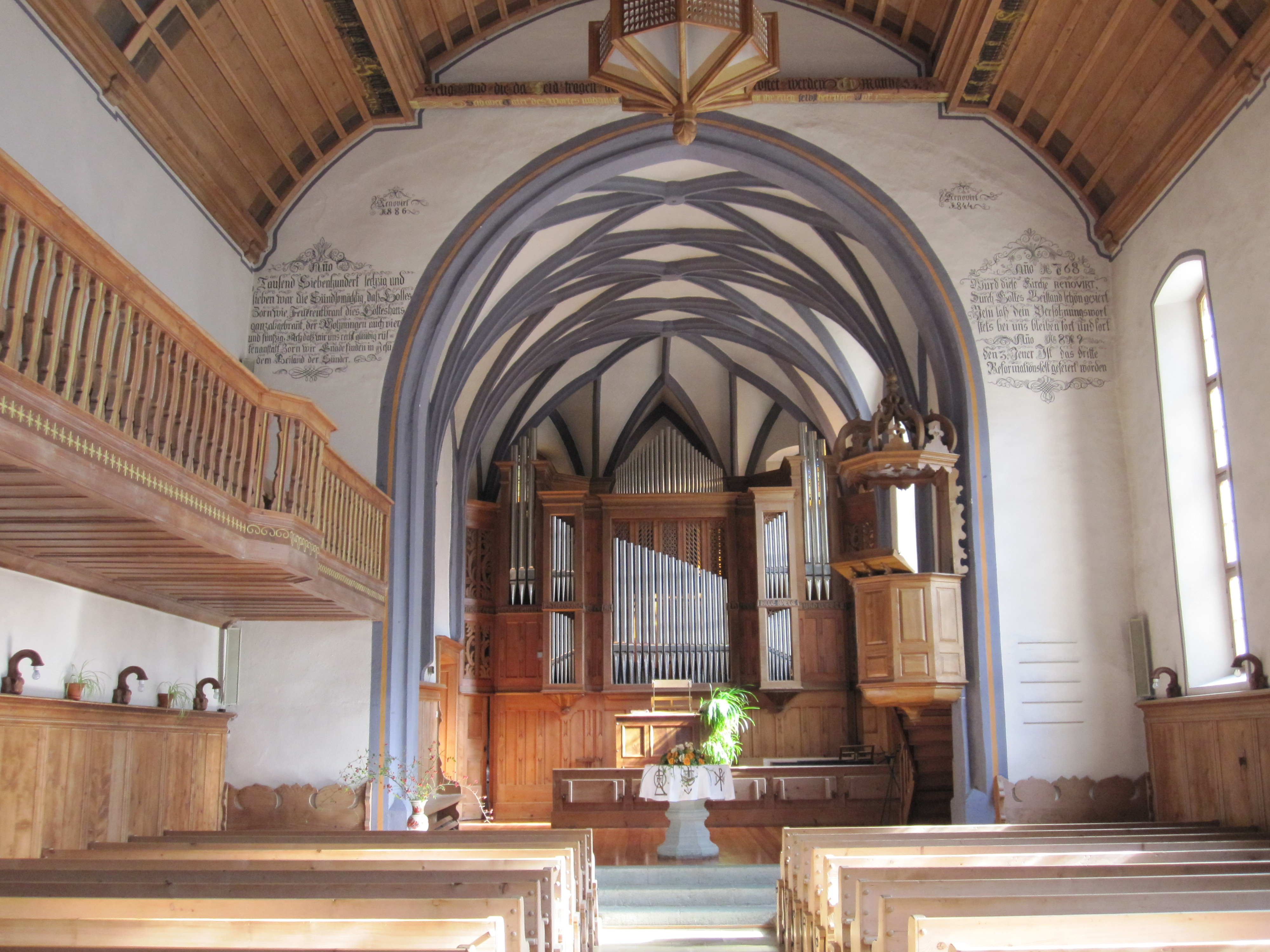 reformierte Kirche Schiers (Kanton Graubünden)